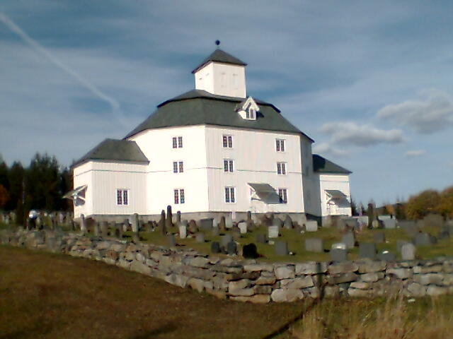 Aamot Kirke Torpa Nordre Land